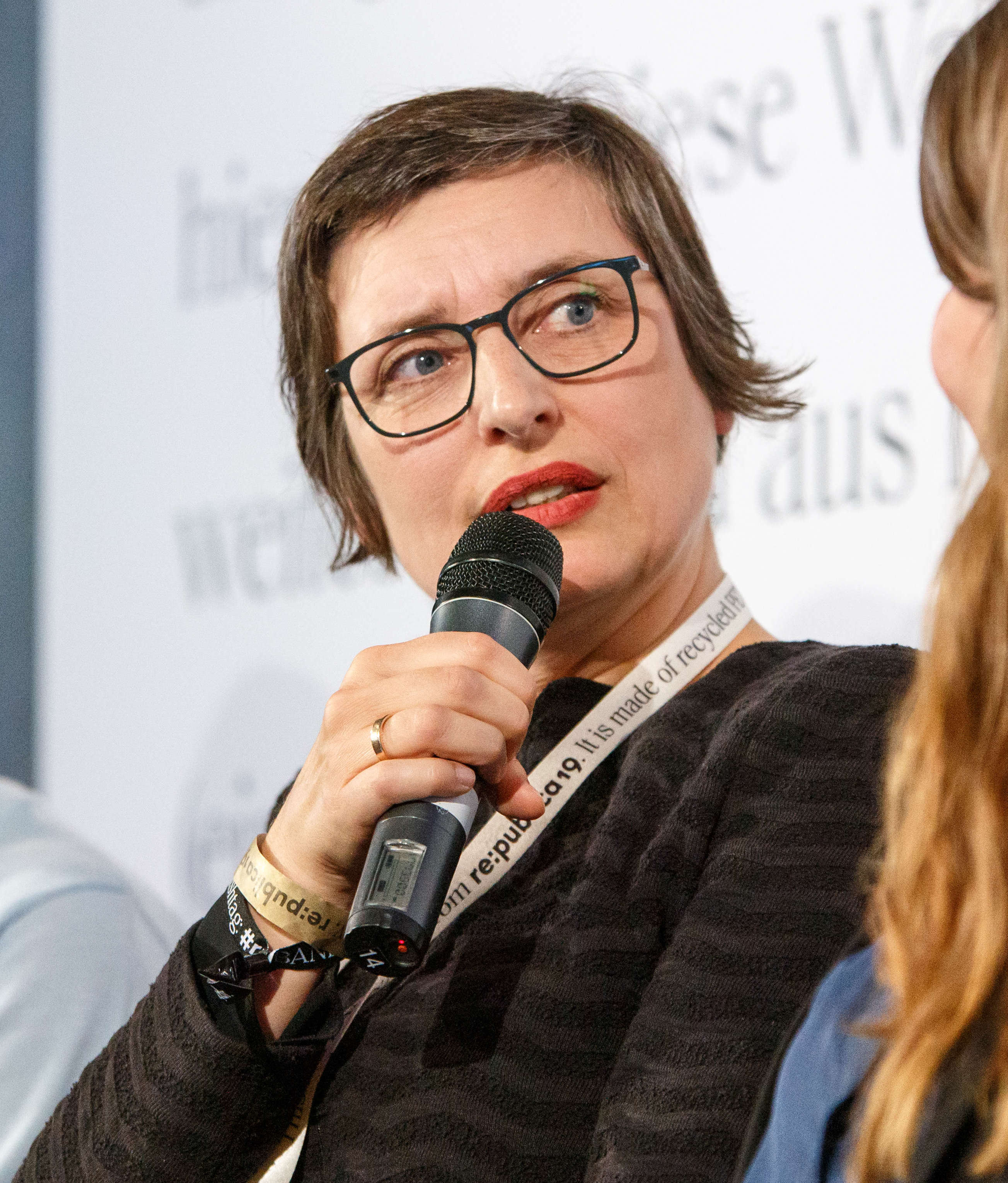 Discussion: Wieviel Wissenschaft hält YouTube und wieviel YouTube hält Wissenschaft aus? Speaker: Julia Althoff, Michael Büker, Florin Noël Haidar, Robin Blase, Annette Leßmöllmann, Amanda Brennan